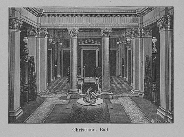 Fra interiøret til Christiania bad, åpnet 1883.